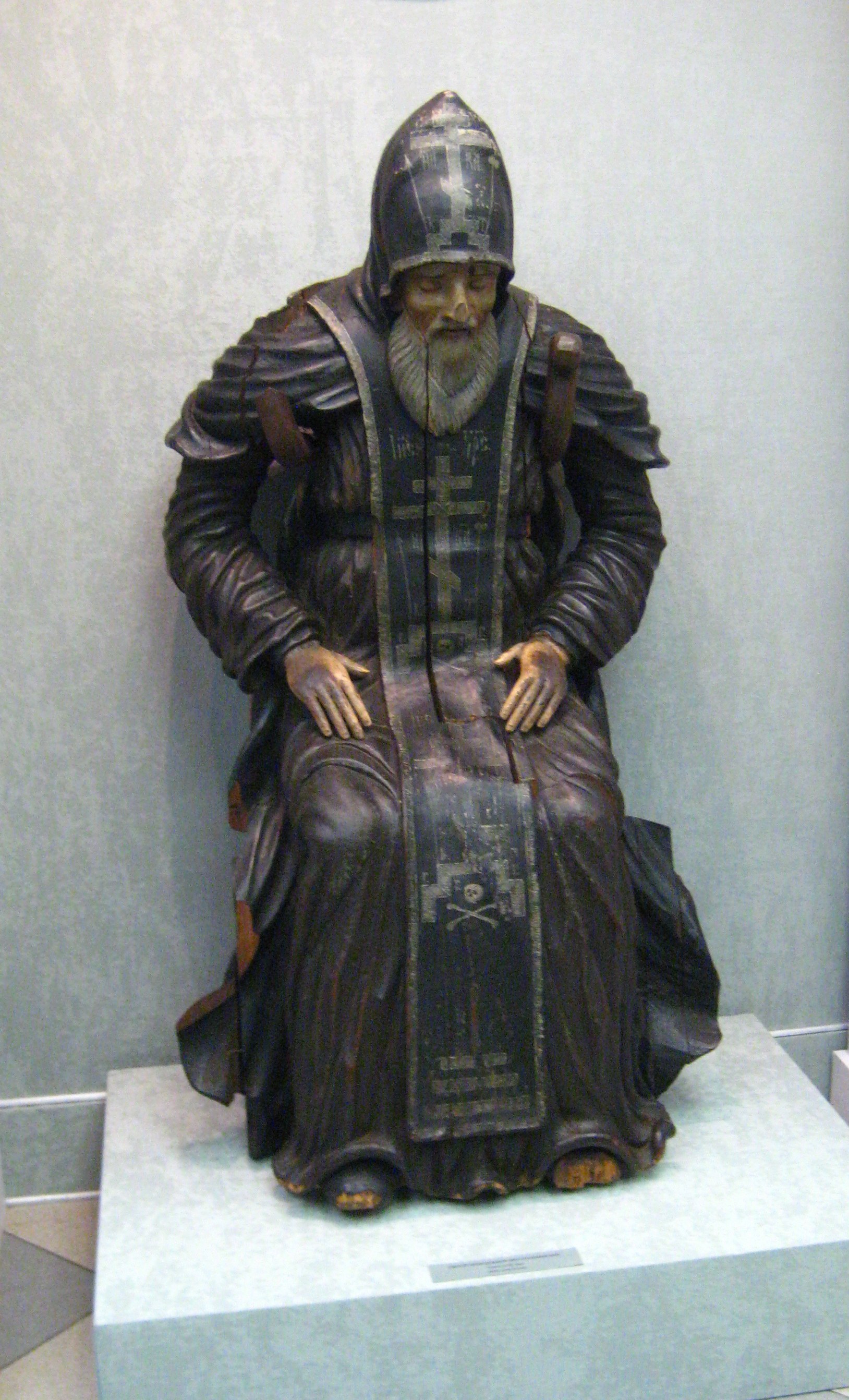 Деревянная скульптура преподобного Нила Столобенского, почитается чудотворной, 18 век, анонимный автор